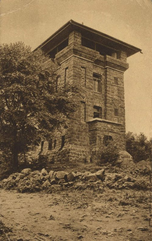 Thematische Serie zu Bismarck-Türmen, Motiv Vacha